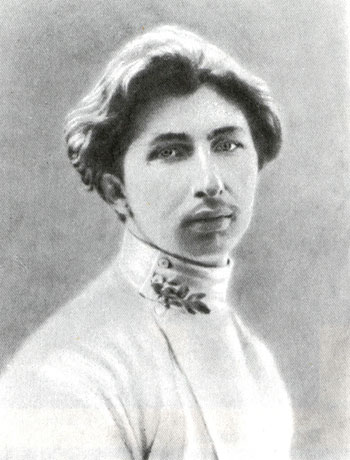 Фотография русского поэта Сергея Городецкого